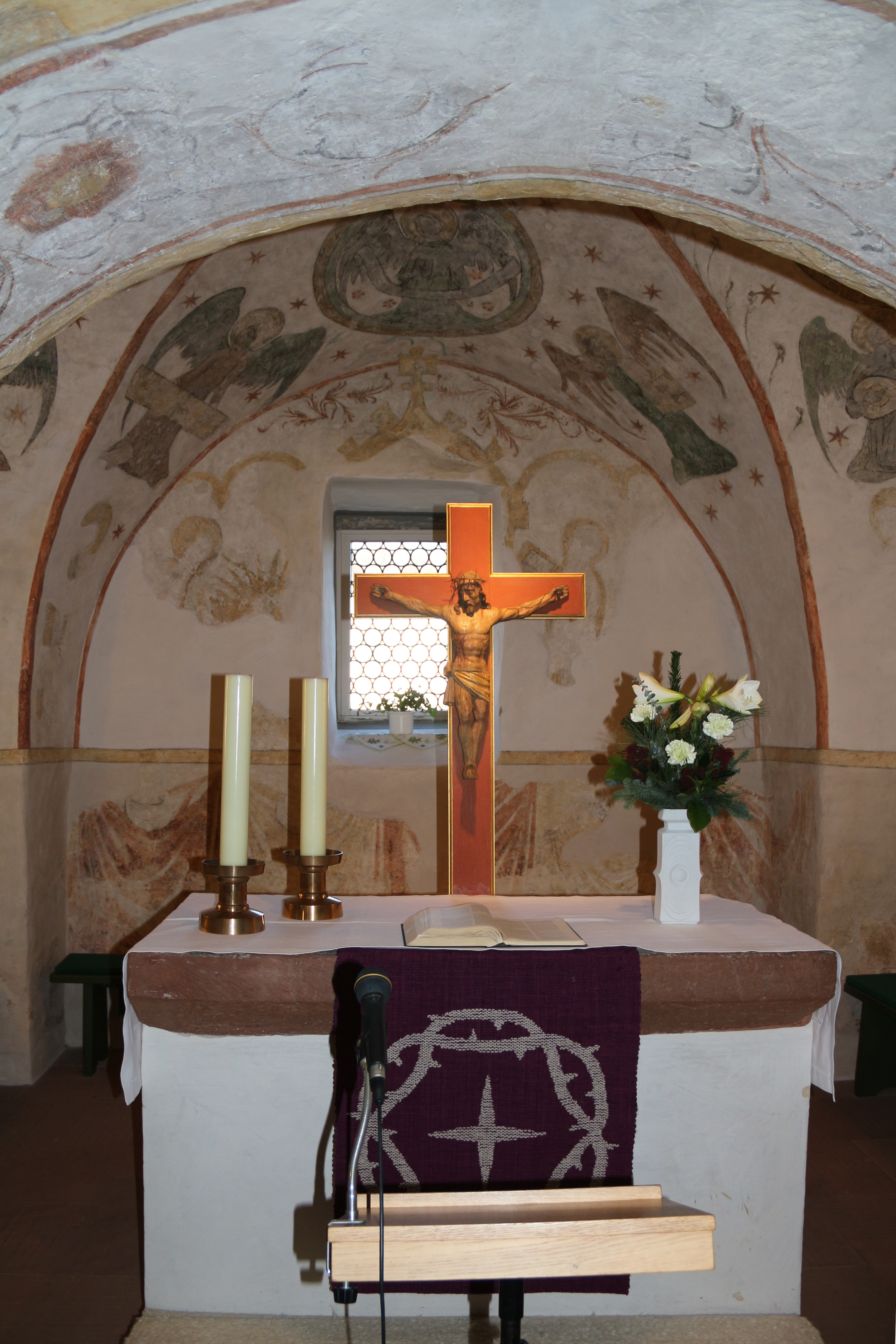 Kirche